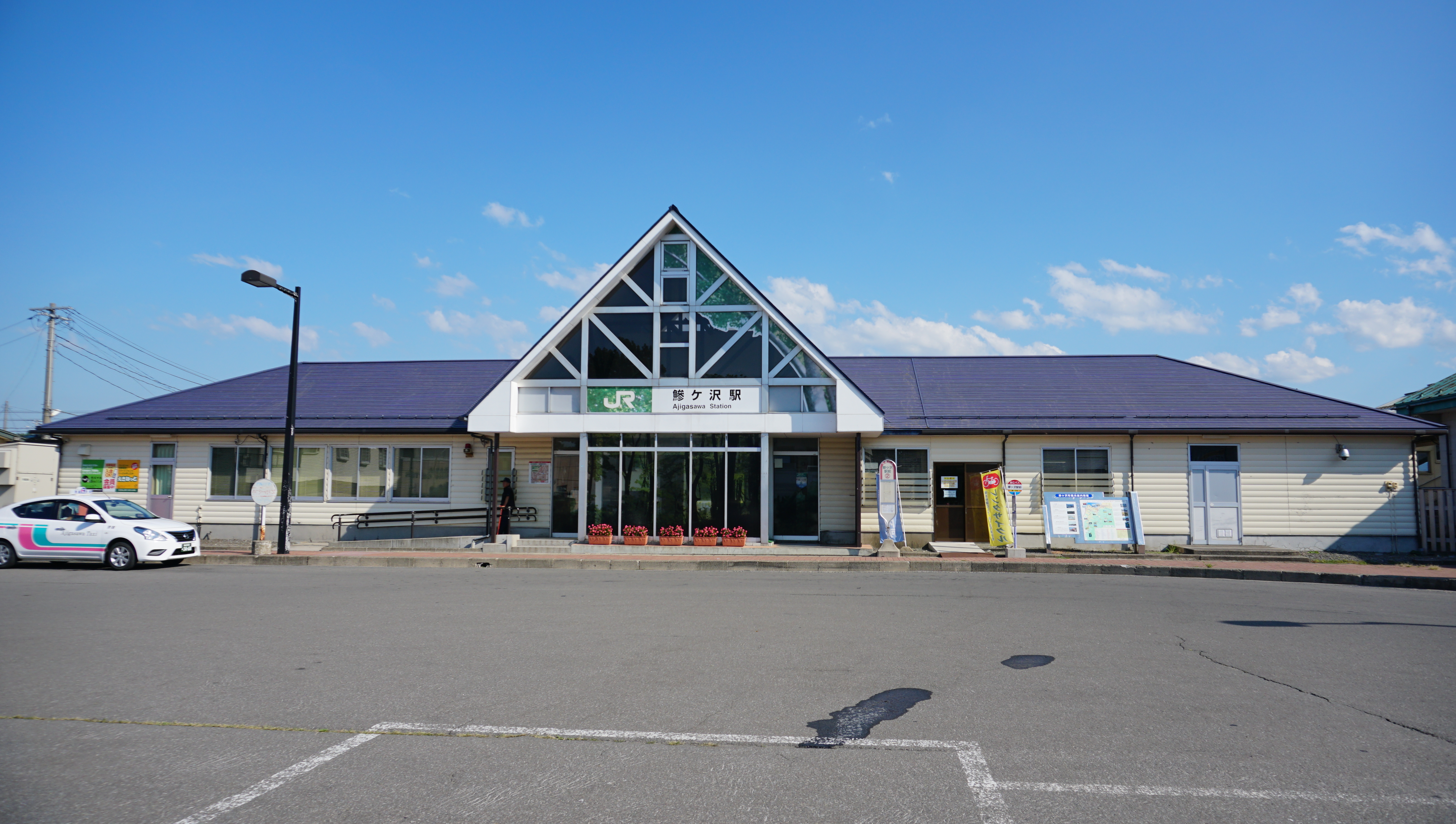 五能線 鰺ヶ沢駅（青森県西津軽郡鰺ヶ沢町）